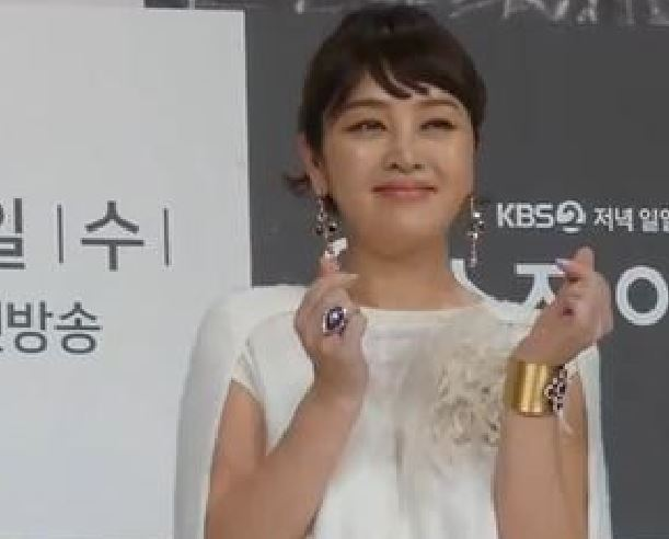 27일 오후 서울 영등포구 영등포동 타임스퀘어 아모리스홀에서 KBS 2TV 일일드라마 '왼손잡이 아내' 제작발표회가 열렸다. 이날 제작발표회에는 하연주, 이수경, 진태현, 김진우, 이승연이 참석했다.